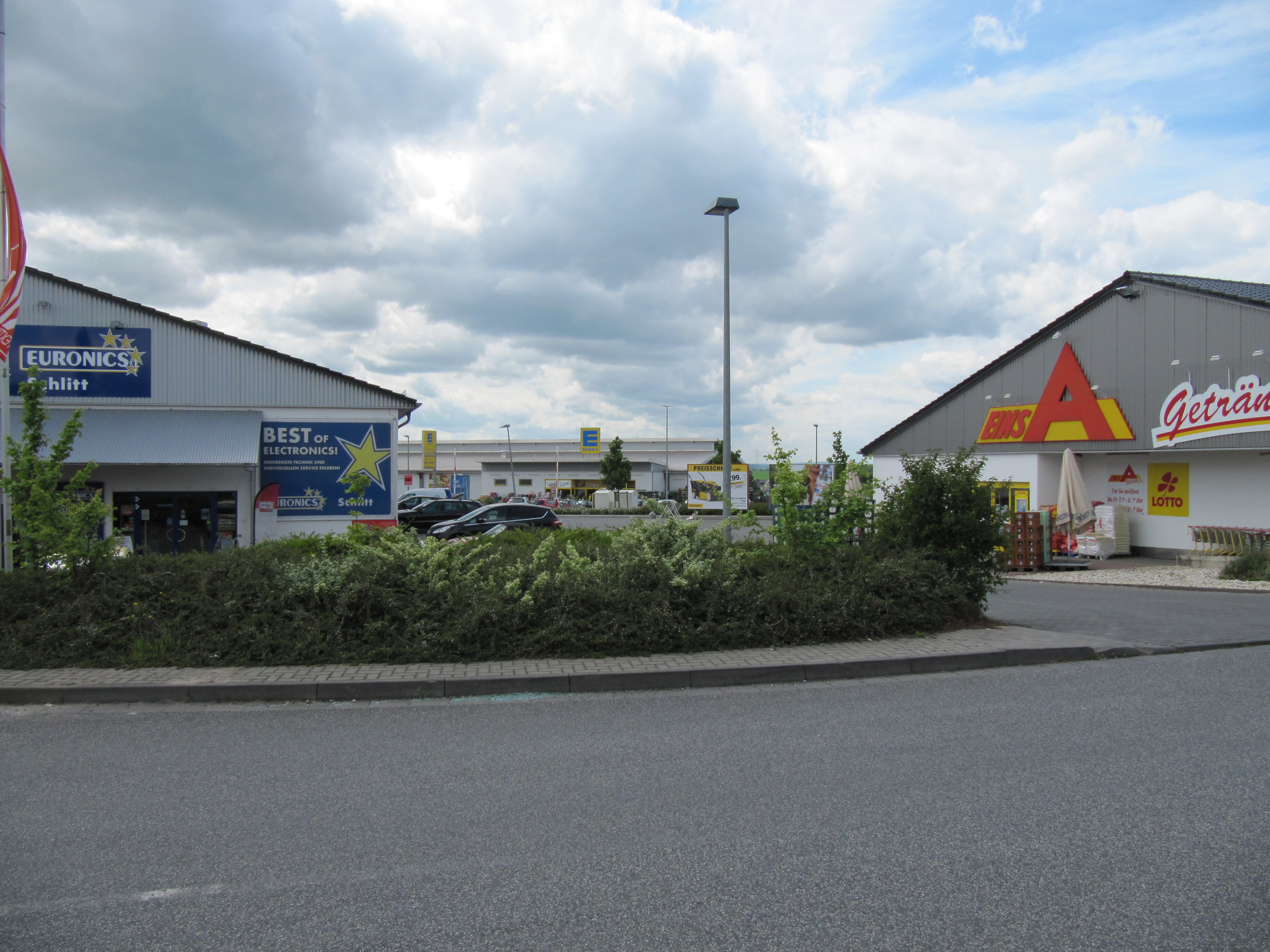 Obertiefenbach (Beselich) – Einkaufszentrum an der B49